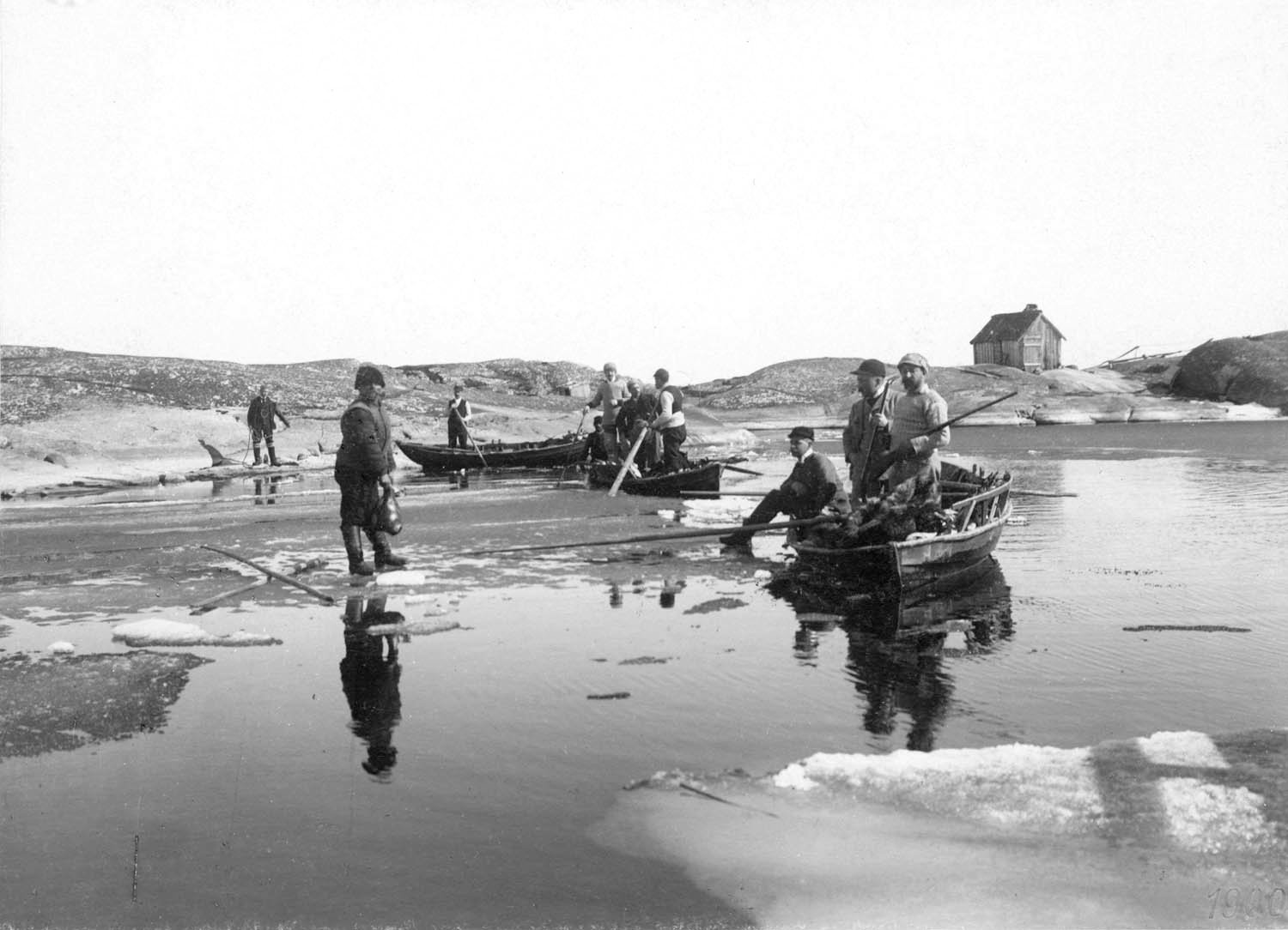 Depicted place: Uppland, Värmdö skeppslag, Värmdö, Stora Nassa (Sverige (SE))